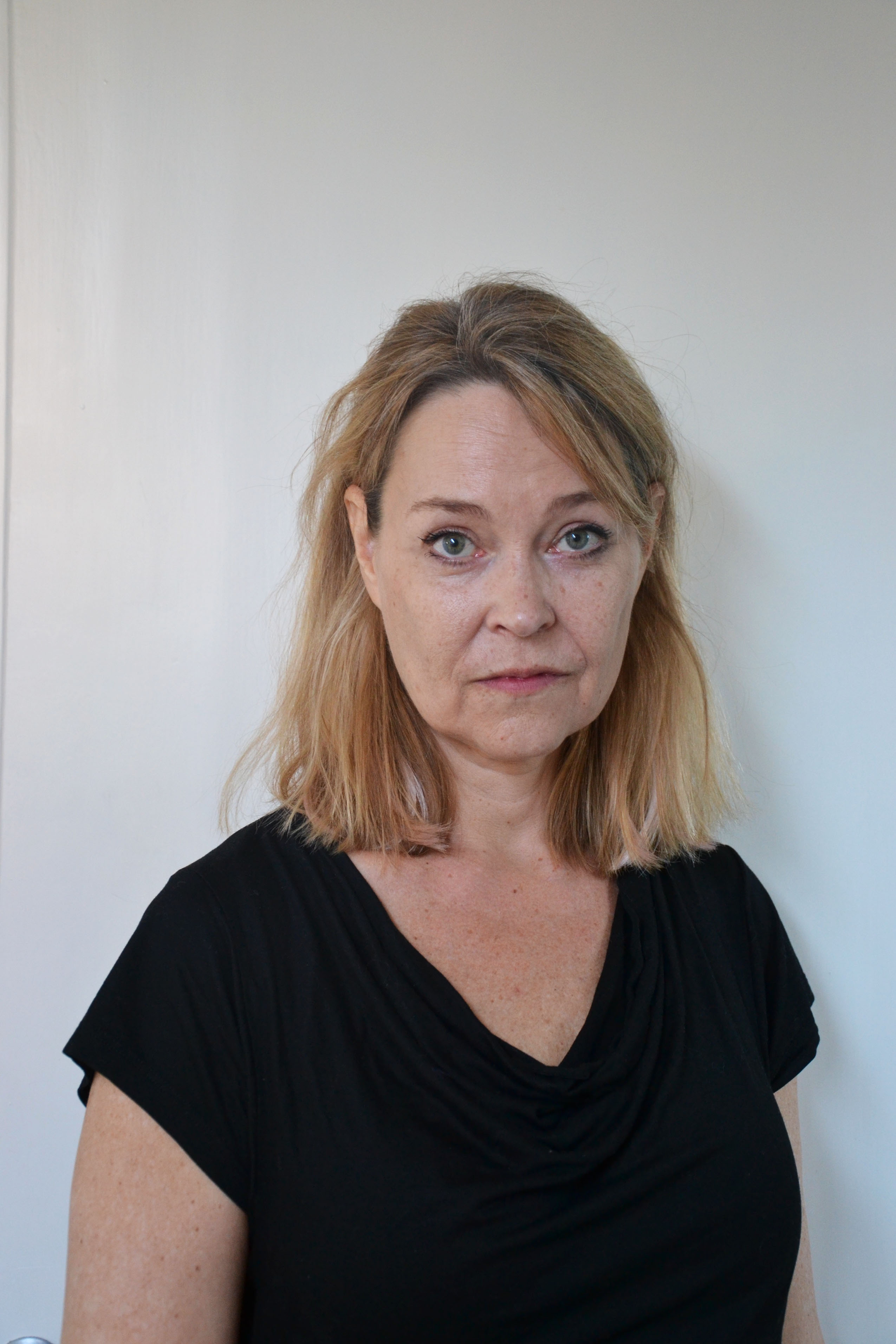 Medicine doktor, docent Johanna Ulfvarson